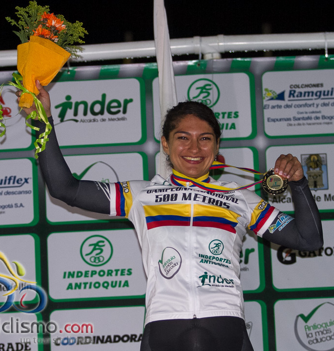 Juliana GaviriaViernes 18 de octubre de 2013 Velódromo Martín Emilio Cochise (Medellín) Campeonato Nacional de Pista 2013 Foto: ©